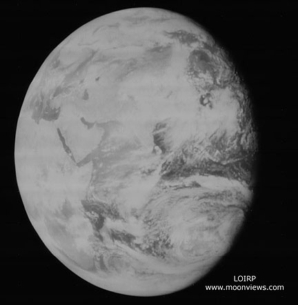 Первое в истории изображение целой Земли (реставрация). Выполнено с помощью орбитальной станции Lunar Orbiter V